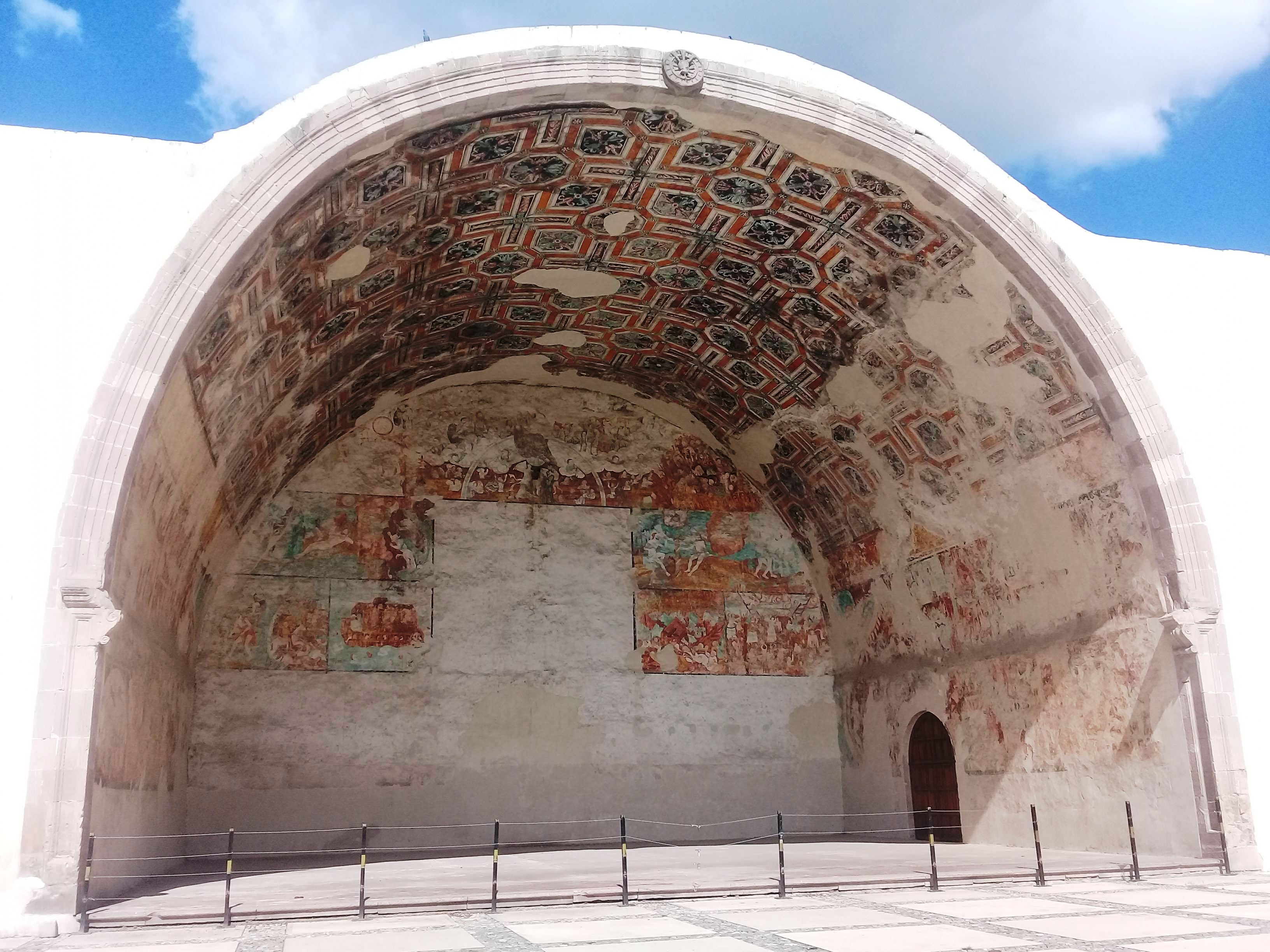 Templo y exconvento de San Nicolás de Tolentino (Actopan).